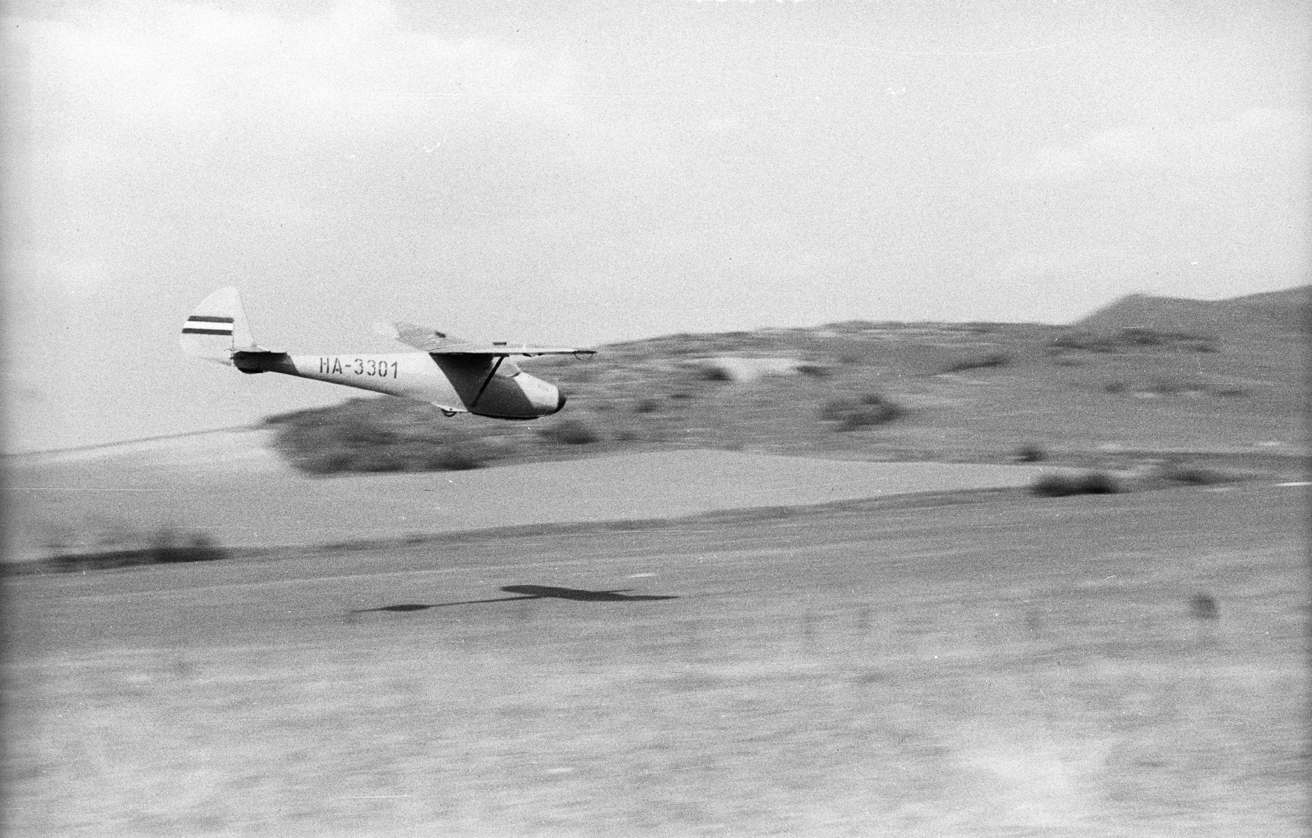 Rubik B-2 Pilis vitorlázó repülőgép. Location: Hungary, Budapest II., Hármashatárhegy Airport Tags: airplane, airport, sailplane, Hungarian brand, Budapest Title: Rubik B-2 Pilis vitorlázó repülőgép.